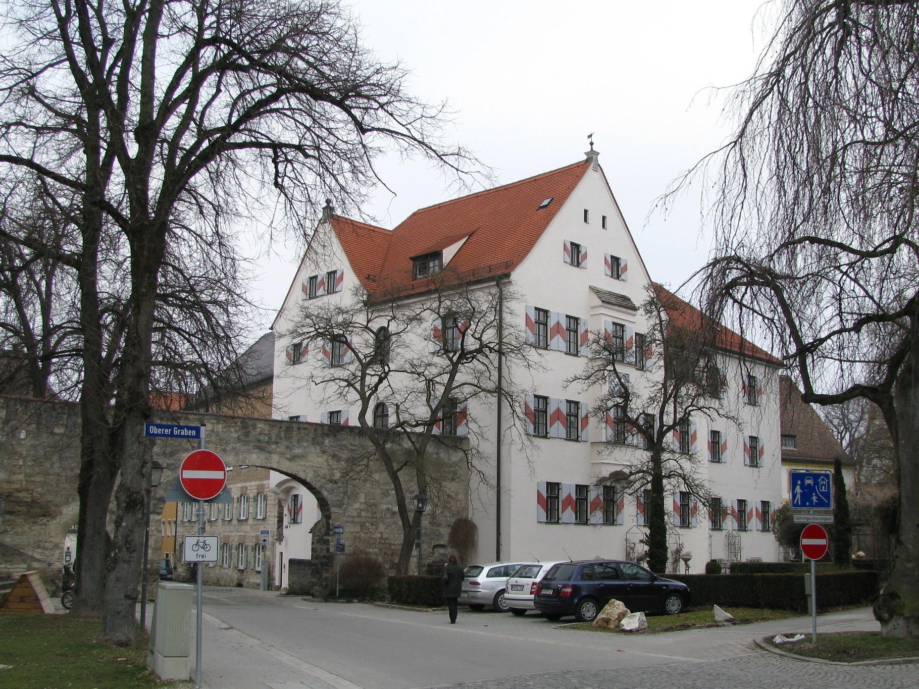 Ehem. Sitz des Landrichters, des späteren Rent- und heutigen Finanzamtes in Weilheim, Oberbayern.